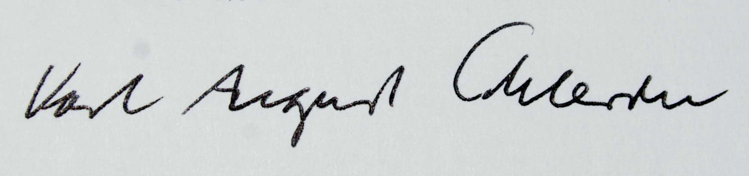 Autogramm des Verlegers Karl August Schleiden (1928-2009